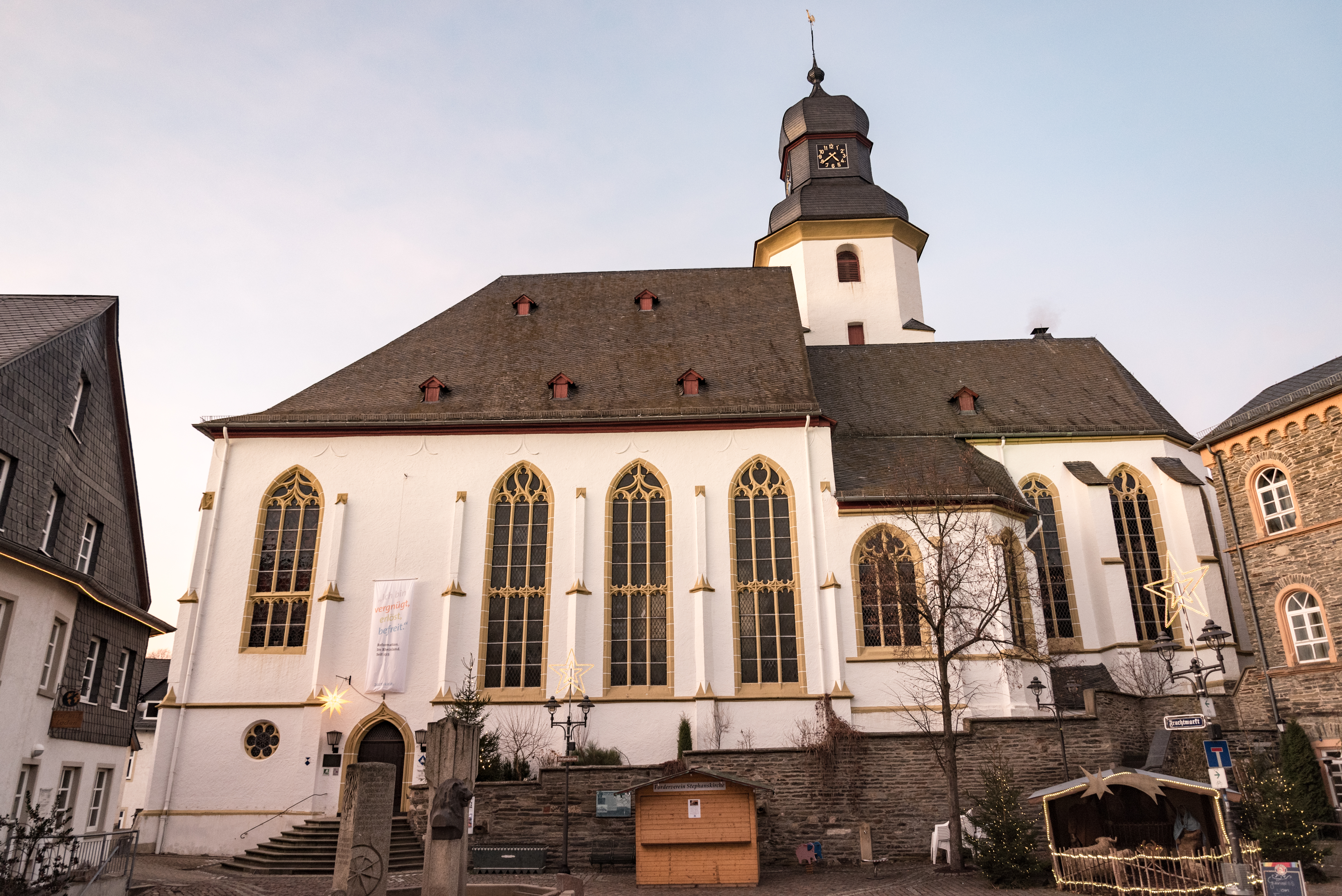 Simmern, Römerberg 2, Evangelische Kirche St. Stephan